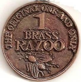 A Brass Razoo. c.1984